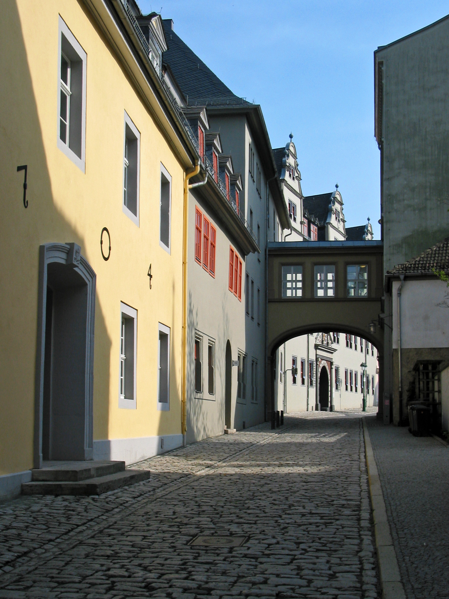 Die Kollegiengasse in Weimar. Links das Gelbe Schloss und dahinter das Rote Schloss.